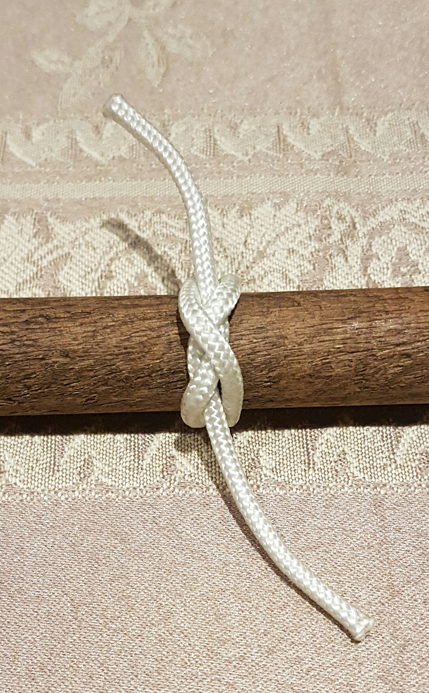 Foto van 'n Konstriktorknoop (Constrictor knot).